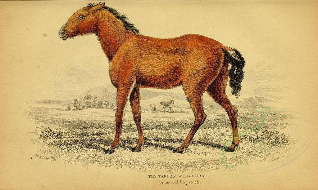 mammals-00027_-_TARPAN WILD HORSE [3124x1871]@G._1_01_